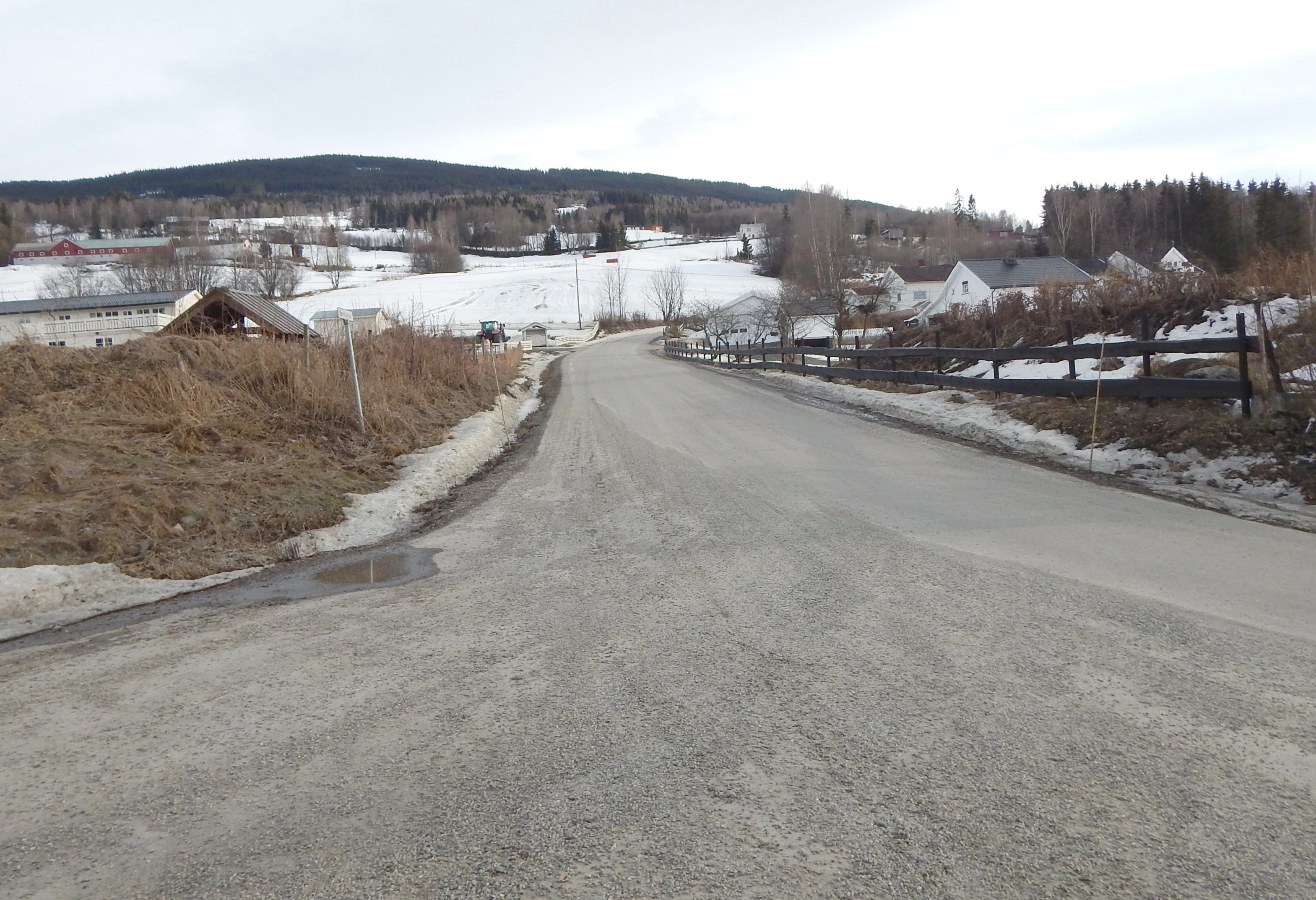 Bjørnstulvegen (fylkesvei 397) sett fra Baksidevegen (fylkesvei 319)